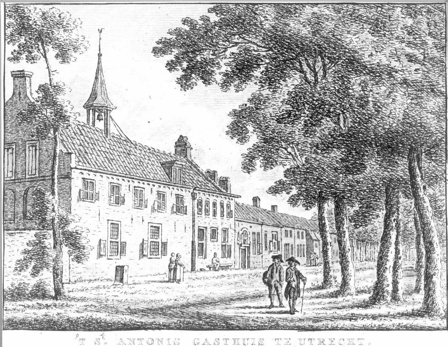 Prent van K.F. Bendorp naar een tekening van J. Bulthuis uit 1788 in de collectie van het Koninklijk Huisarchief, Den Haag (MCS/306; nr. 38295) voor de Tegenwoordige Staat, deel 11. Op de titelpagina van het "Tiende Stel Vaderlandsche Gezichten, of Afbeeldingen, Behoorende tot den Tegenwoordigen Staat der Vereenigde Nederlanden" staat vermeld dat Bulthuis in het jaar 1788 de tekeningen naar het leven maakte.